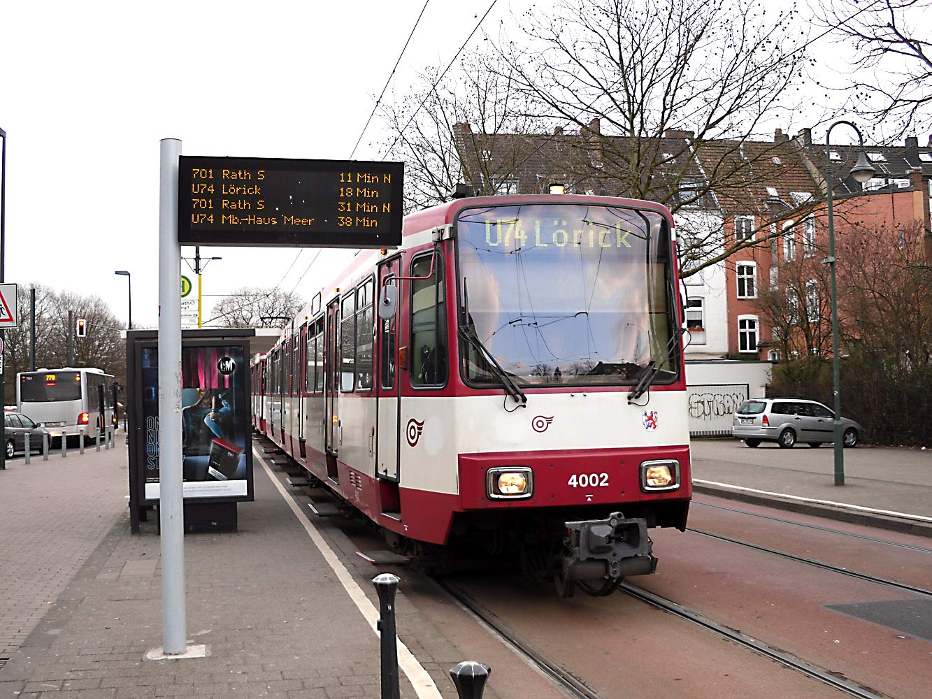 Station Benrath (Düsseldorf)